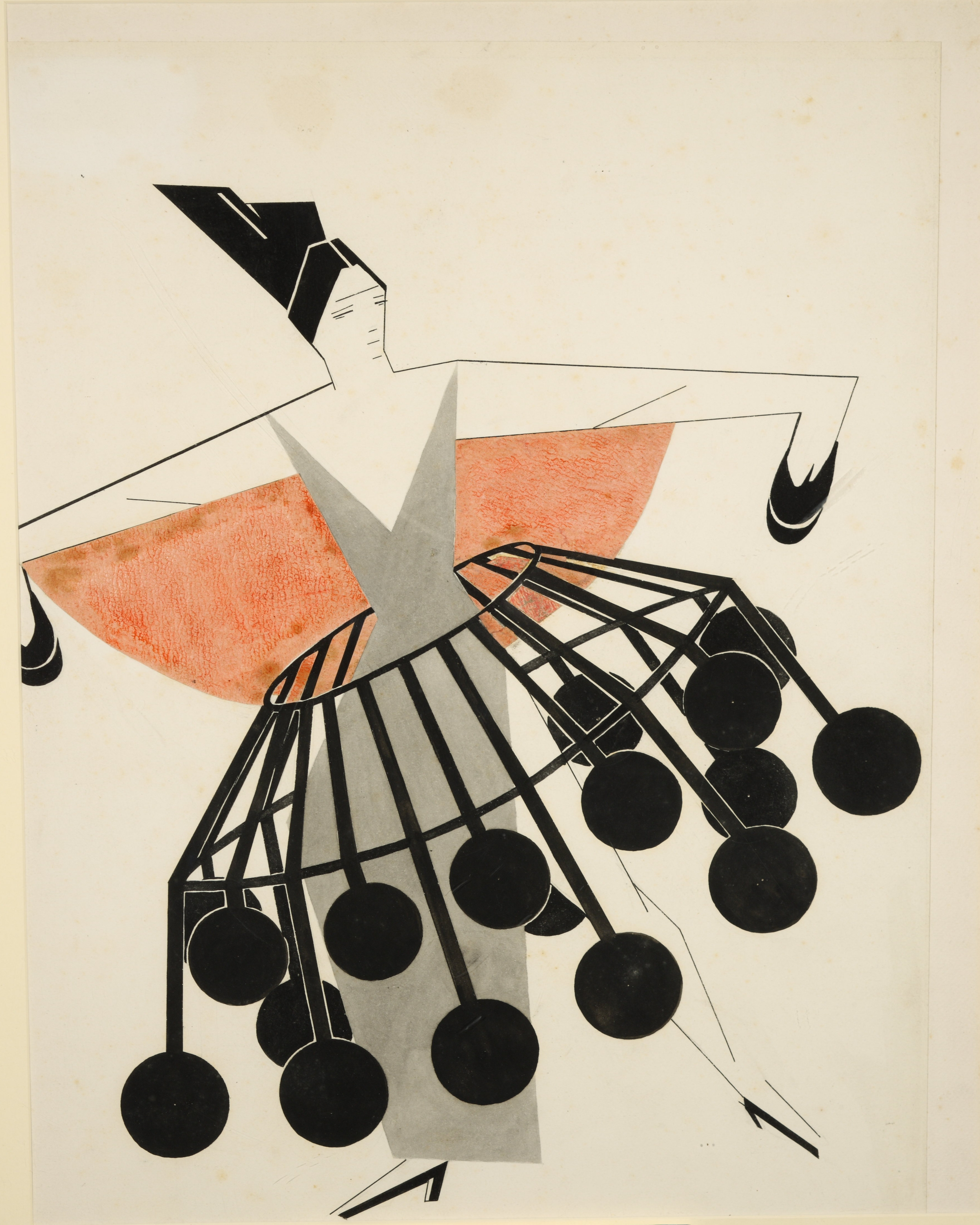 Эскиз костюма женщины в юбке с фижмами. 1924 Коллекция Н.Д. Лобанова-Ростовского